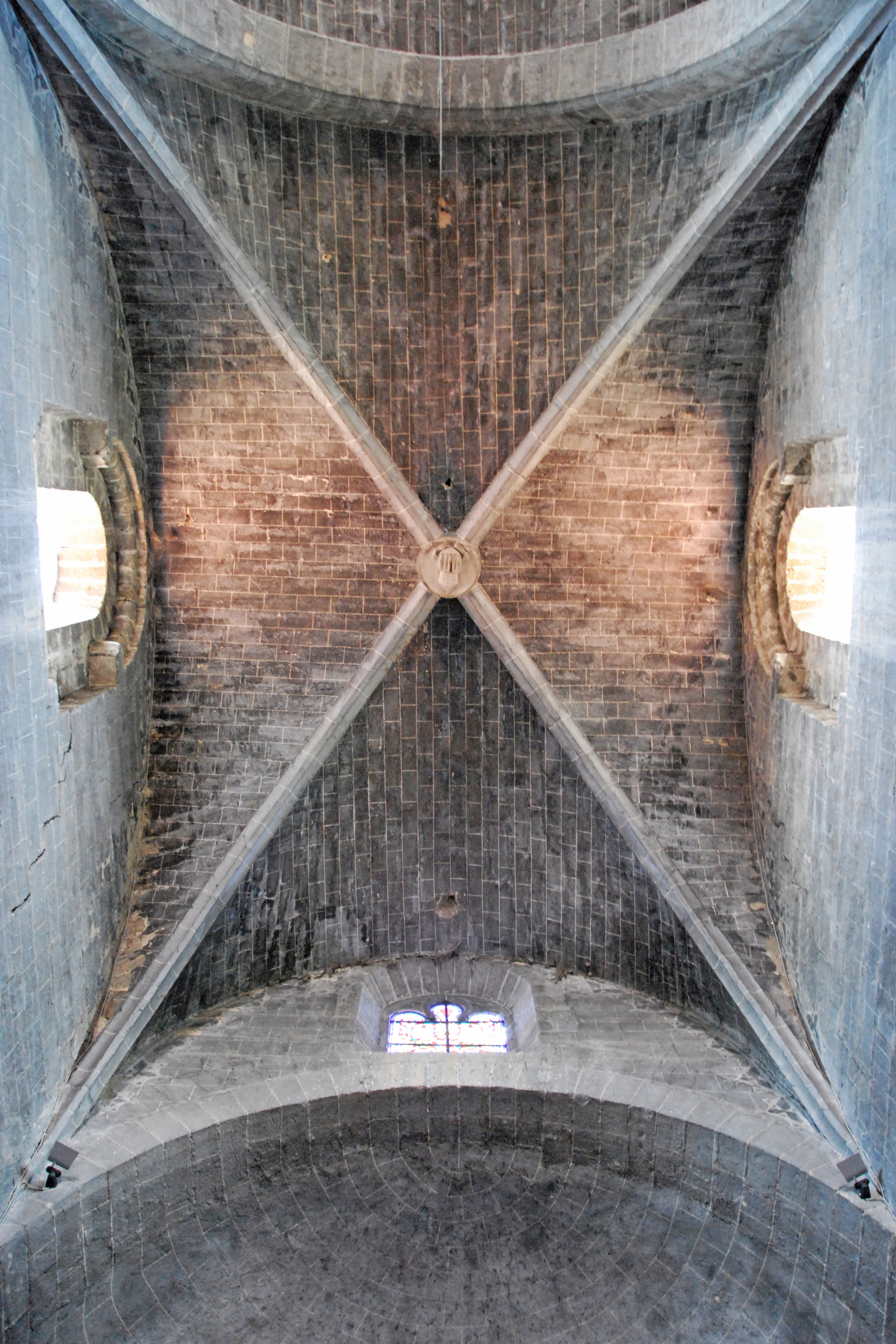 Chanteuges, Kirche, Krteuzrippengewölbe in Joch 4